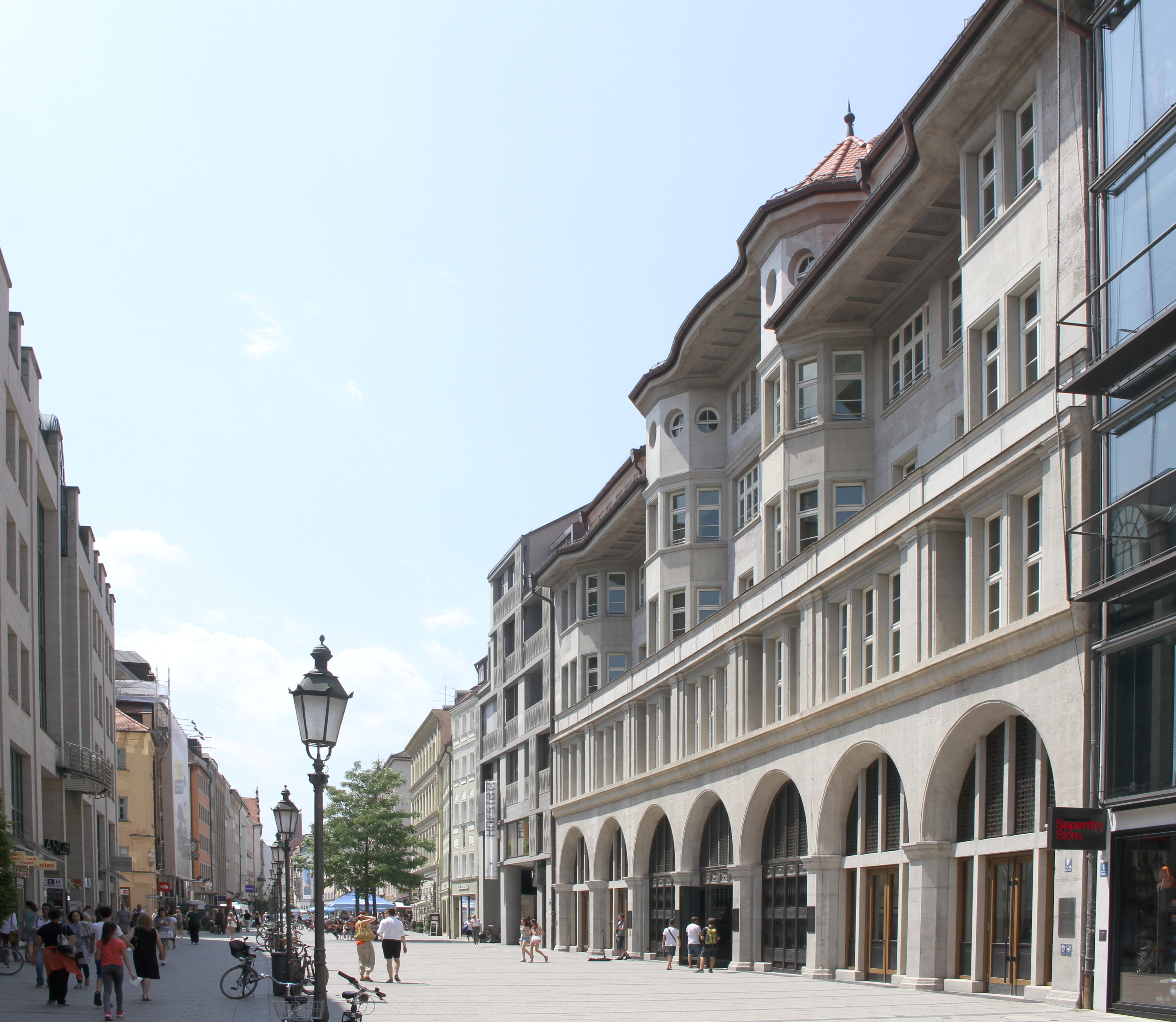 Sendlinger Straße 8, München. Ehemaliges Redaktionsgebäude der Süddeutschen Zeitung. Errichtet von Max Littmann